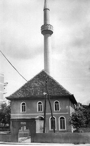 Vidorijska džamija, Bosanski Novi